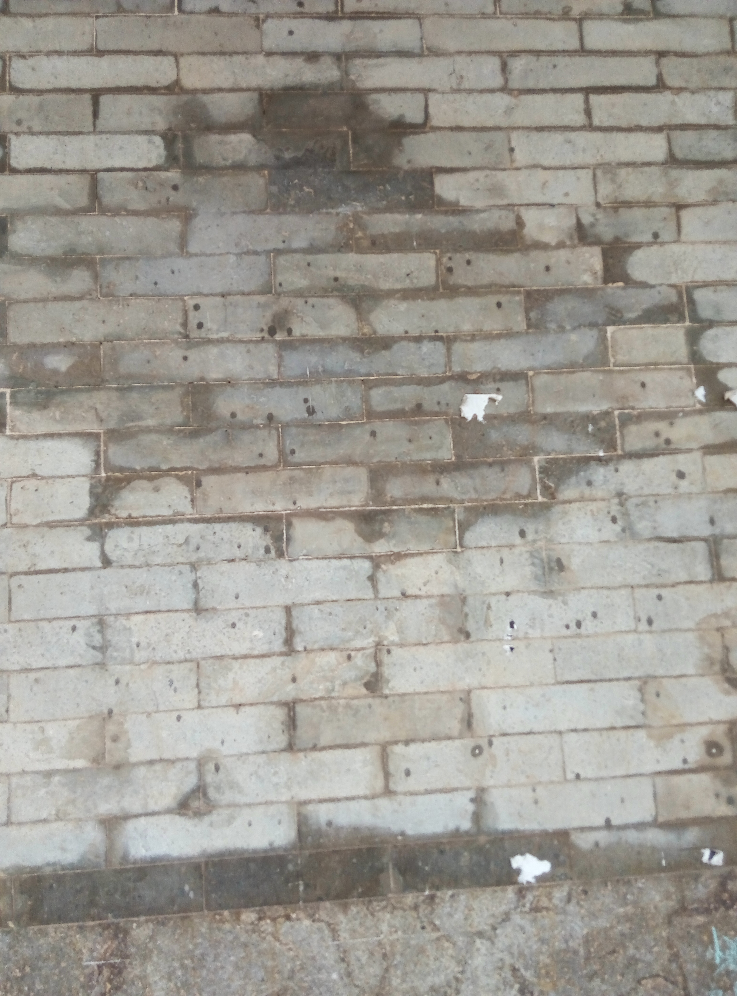 粵語: 瀝滘，慶源堂